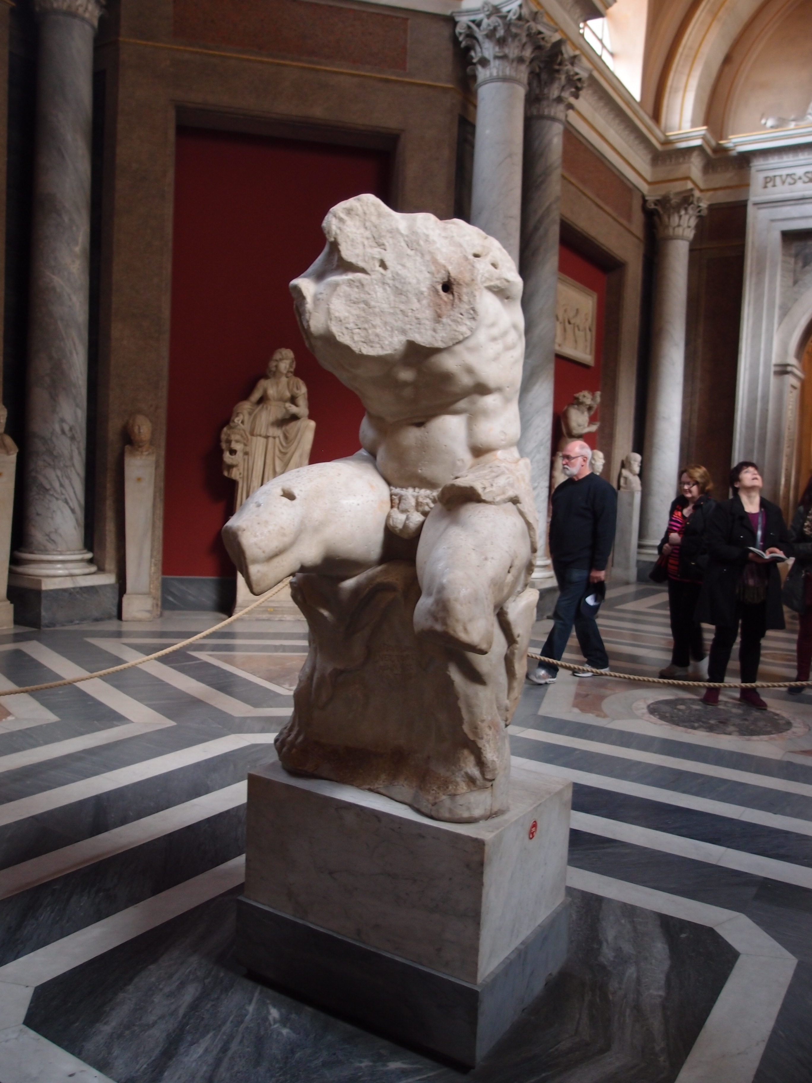 バチカン美術館の像